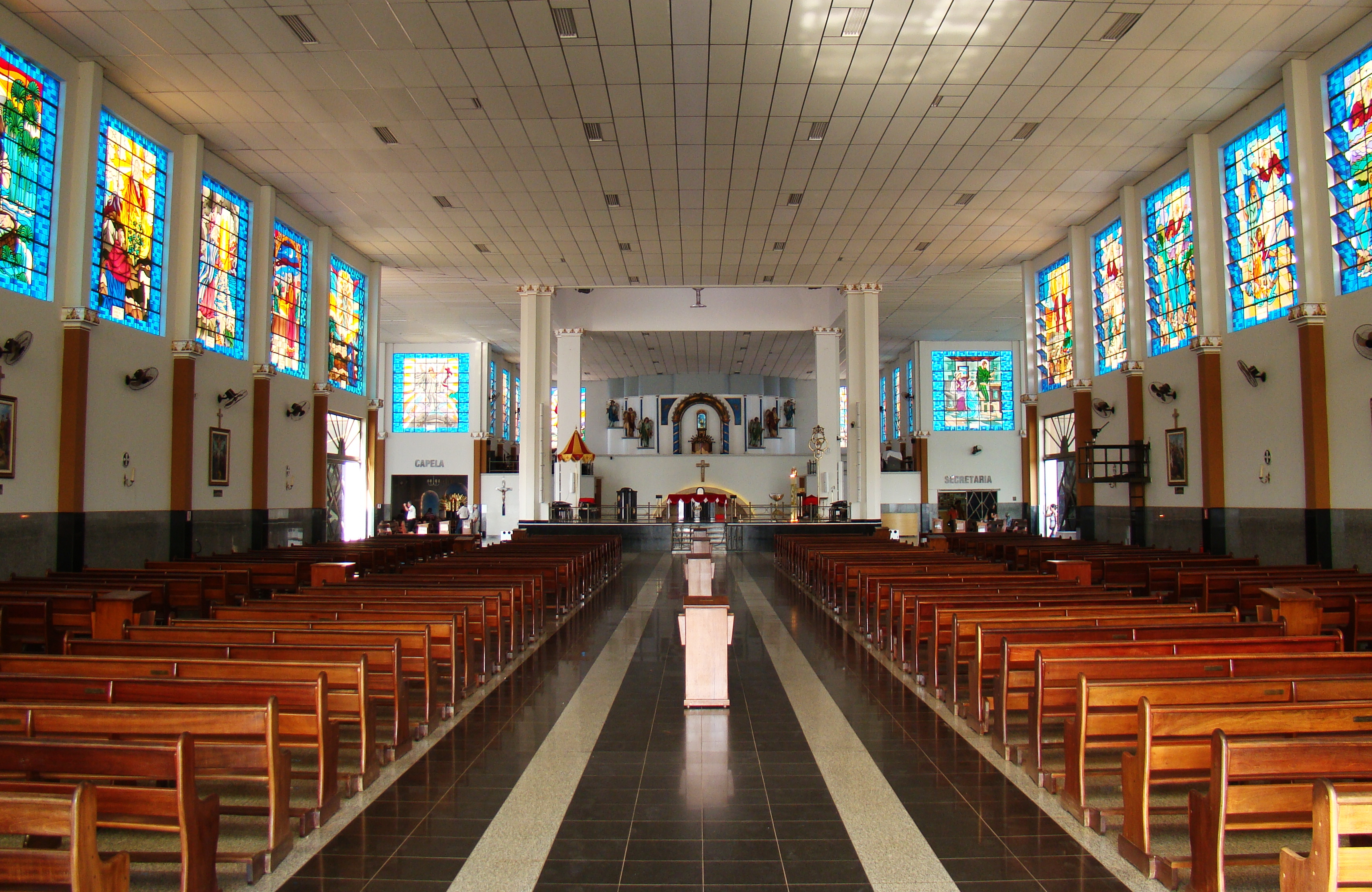 Interior da Basílica do Divino Pai Eterno - Trindade - Goiás - Brasil